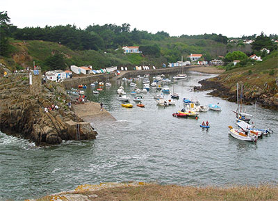 Port-de-la-Meule auf der Île d'Yeu, Frankreich, Pays de la Loire, Vendée. August 2004.